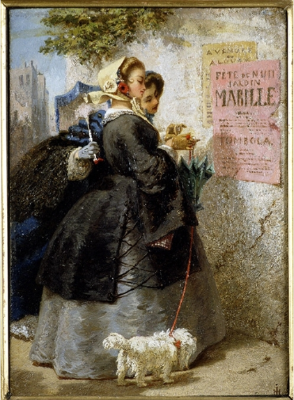 Målning (olja på trä) av Johan Fredrik Höckert. Motiv: moderiktiga damer beskådar affisch med reklam för ett av huvudstaden Paris mest populära nöjesetablissemang – Bal Mabille. Höckert bodde i Paris 1851–1857 och var nog väl bekant me Bal Mabille. Målningen bär undertiteln Tentation (Frestelse).